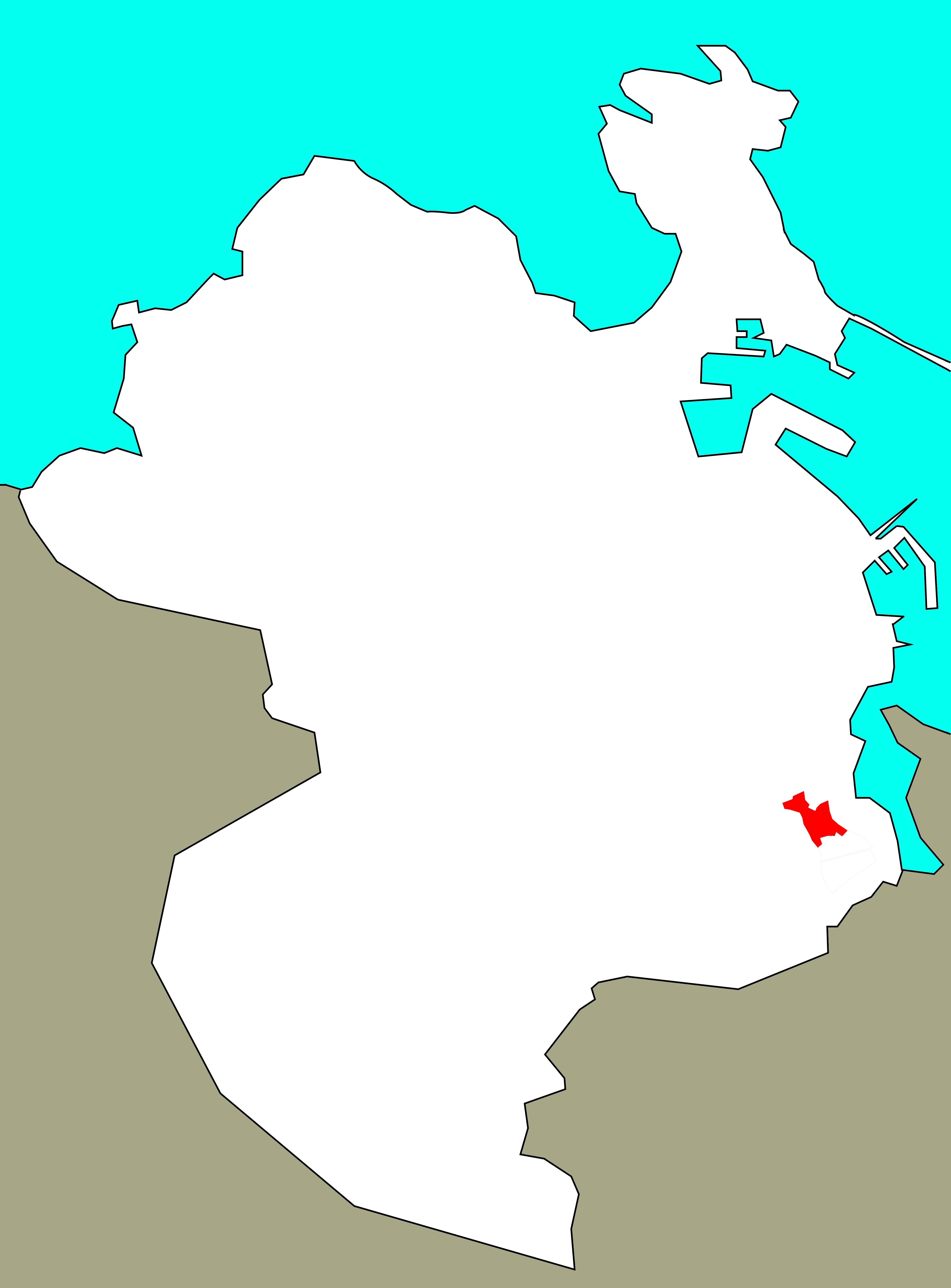 Situación de Pedralonga no concello da Coruña, segundo